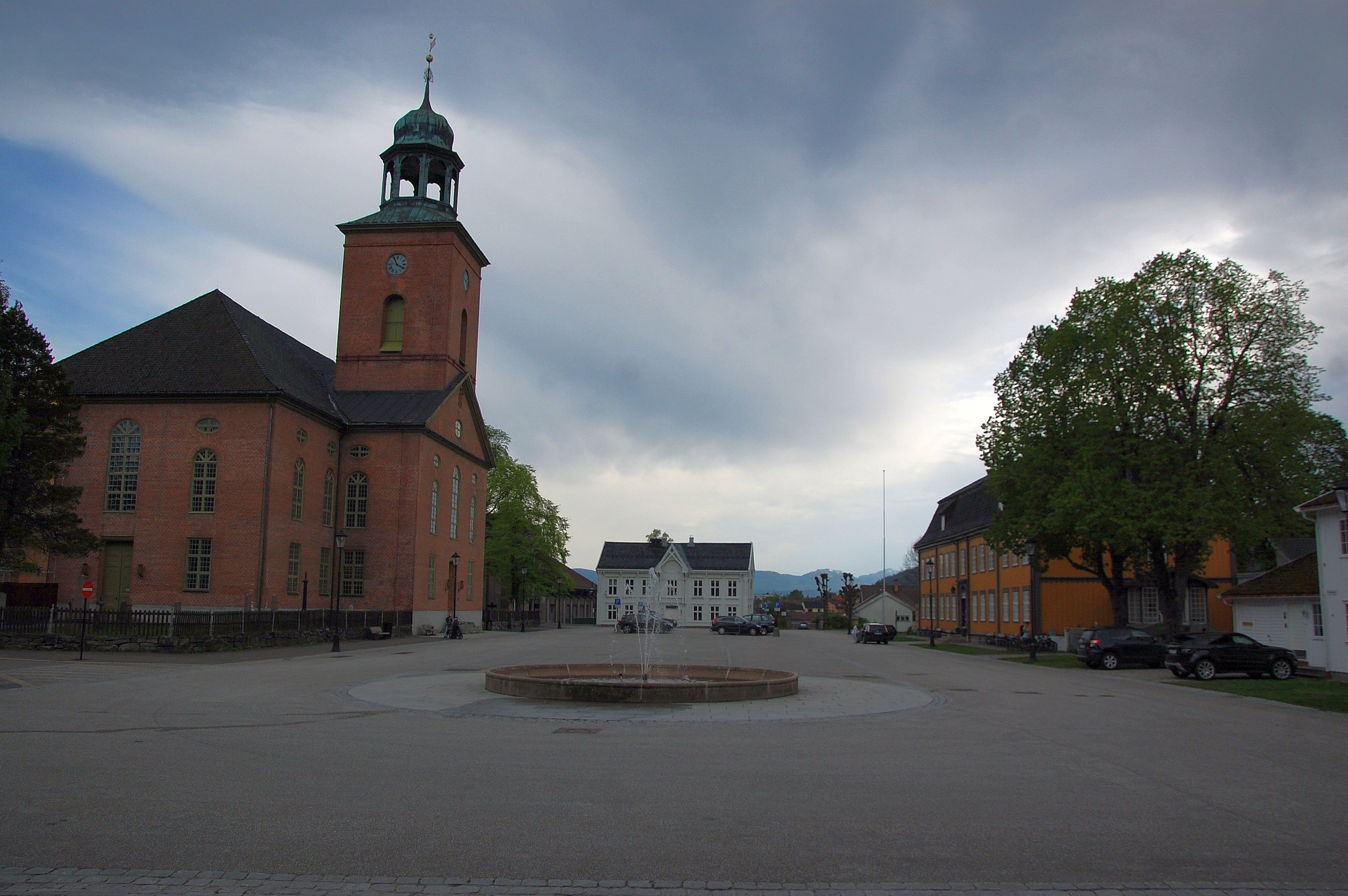 Kirketorget på Kongsberg, Kongsberg kirke til venstre, Kirketorget 2 rett frem, Bergseminaret til høyre